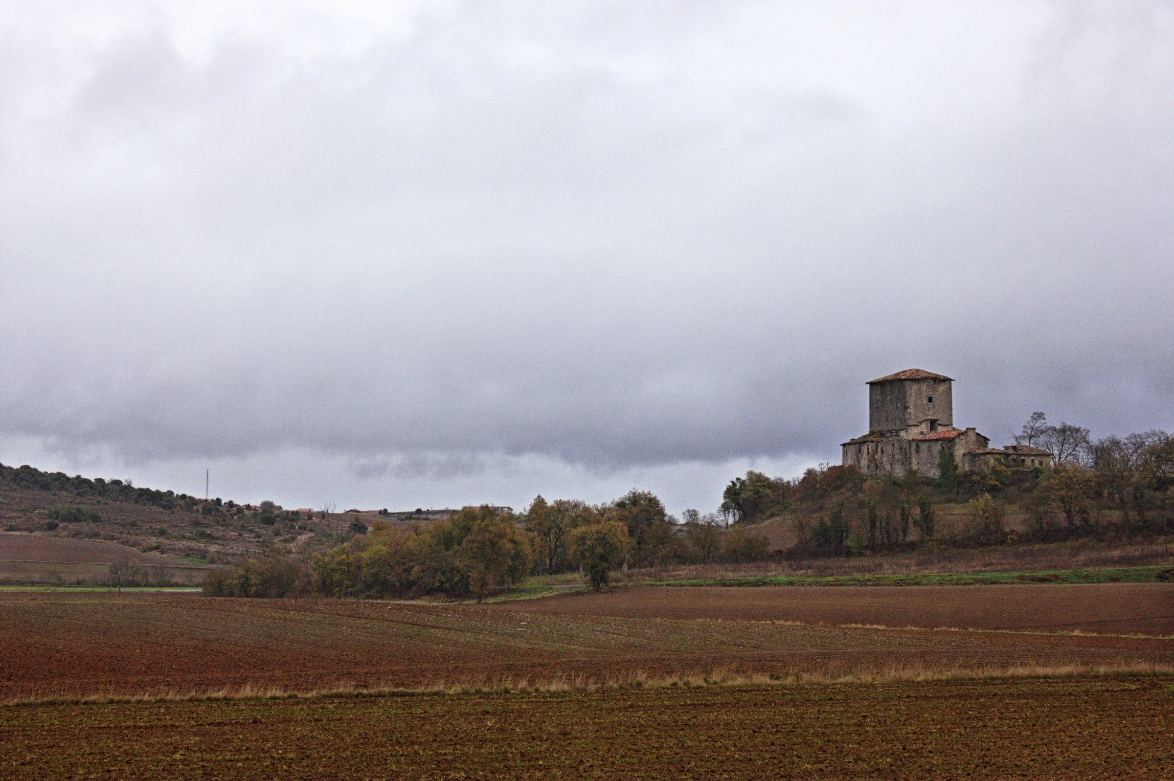 Martiodako dorretxea